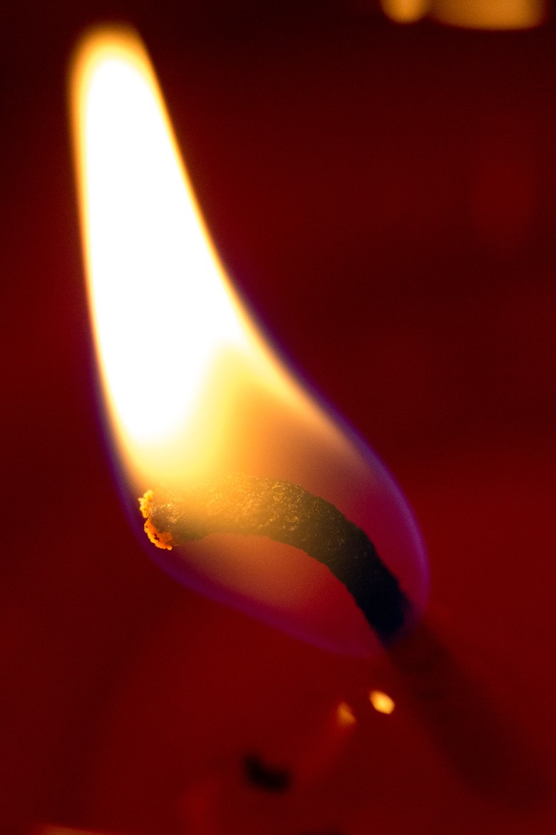 Свеча